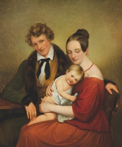 Familienbildnis Fidelis Butsch, Öl auf Leinwand